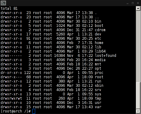 Bash example